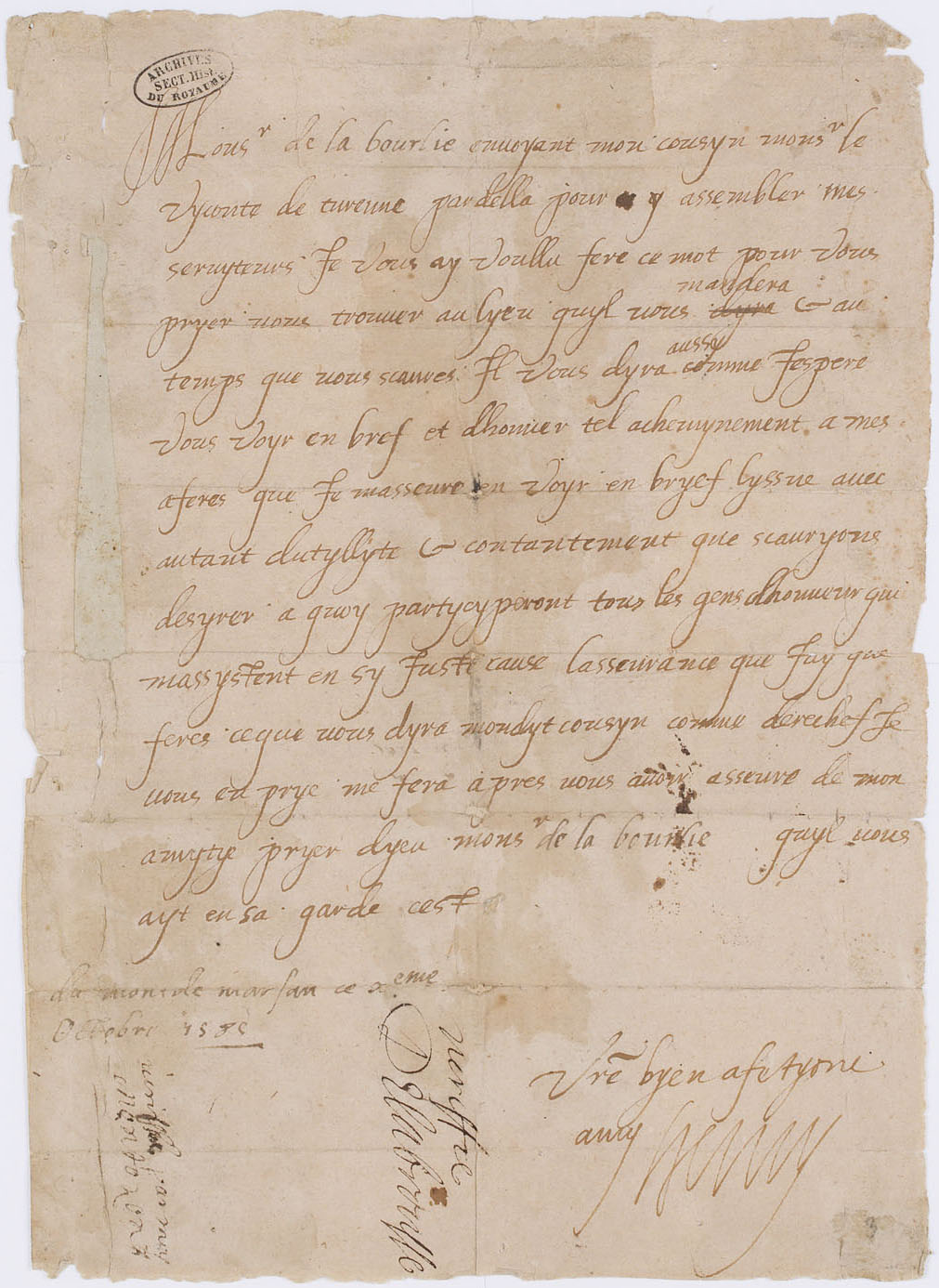 Lettre autographe de Henri de Navarre écrite à Mont-de-Marsan le 10 octobre 1585 et adressée à La Bourlie, lui ordonnant de se mettre à la disposition du vicomte de Turenne qui lève une armée en Gascogne.